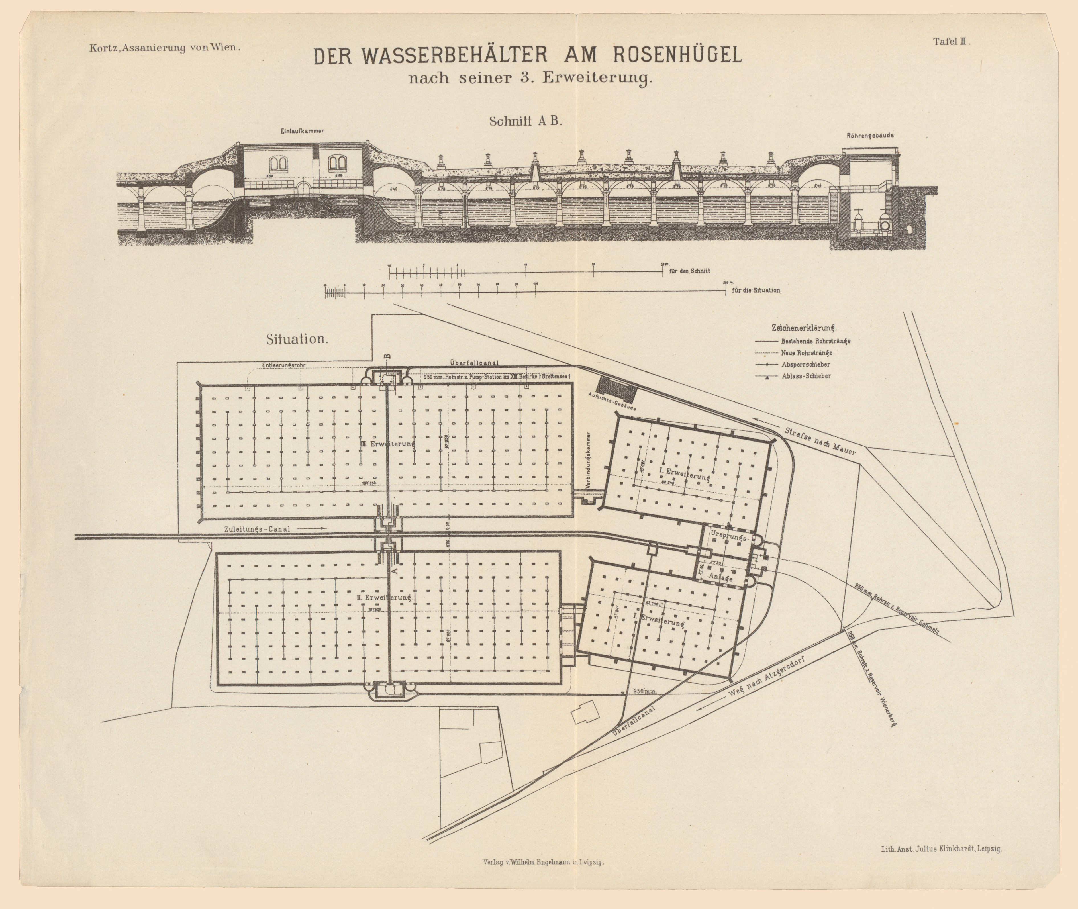 Wasserbehälter Rosenhügel zu Beginn des 20. Jahrhunderts